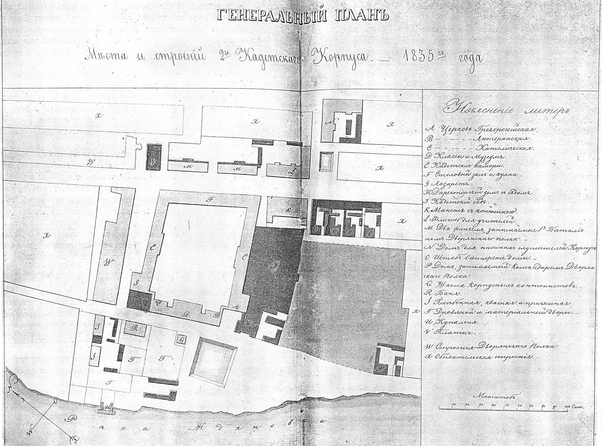 Генеральный план 2КК 1835 года